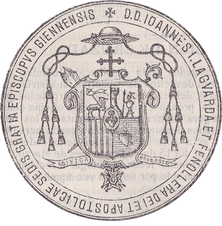 Heráldica de D. Juan José Laguarda y Fenollera, Obispo de Jaén (1906-1909)